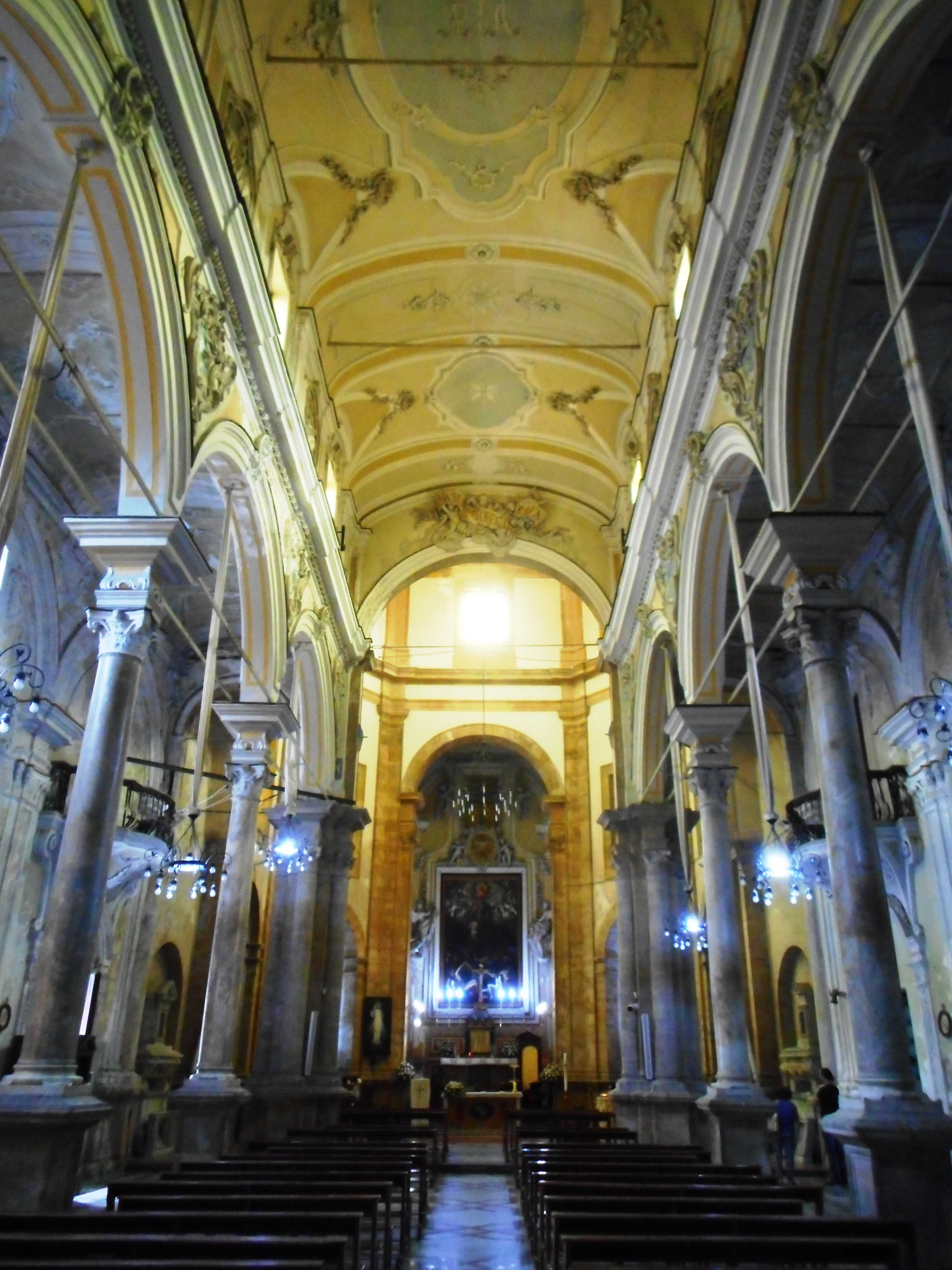 Interno della chiesa di Santa Maria la Nova